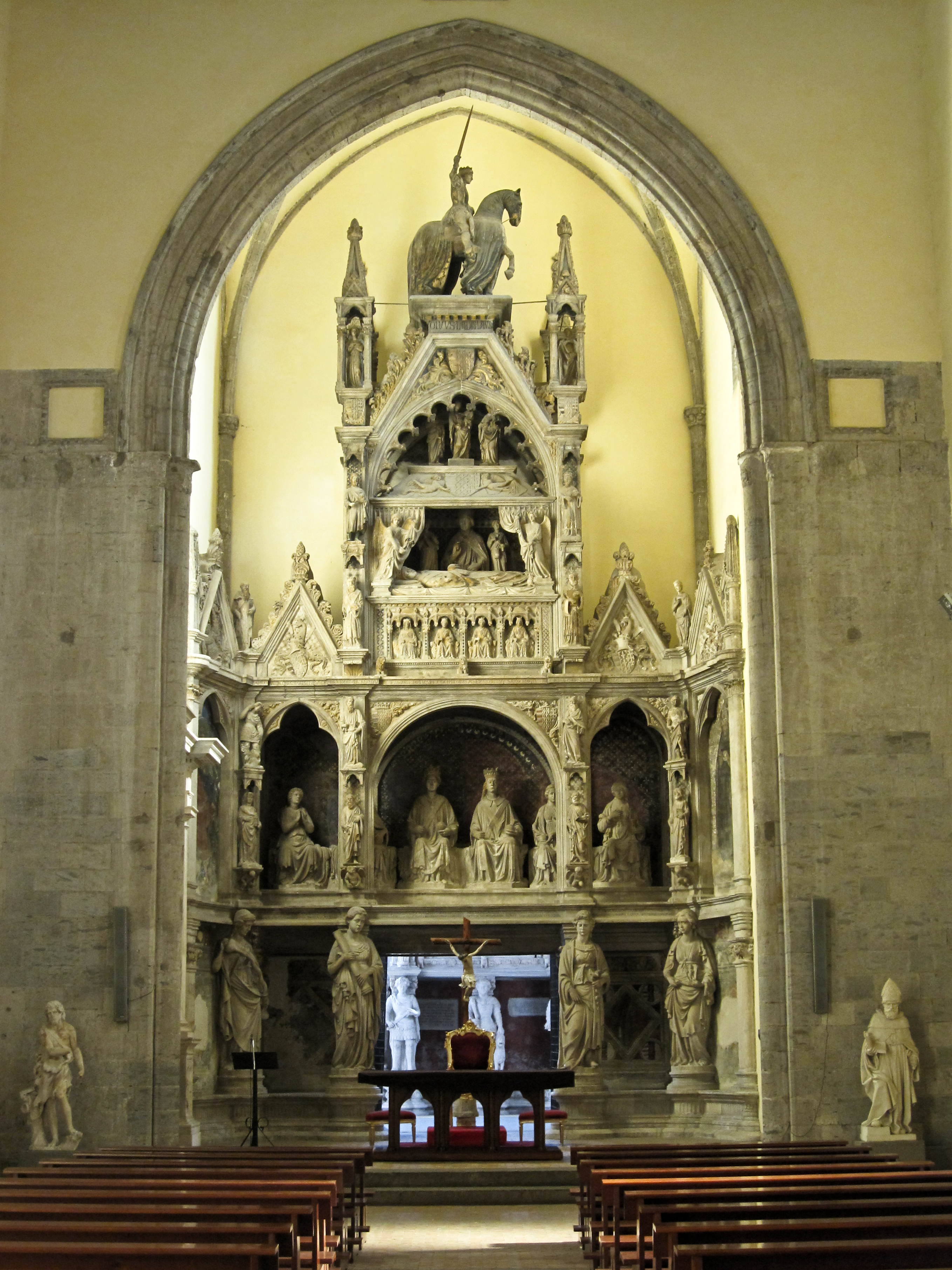 La navata principale e il monumento a Re Ladislao Chiesa di San Giovanni a Carbonara - Napoli